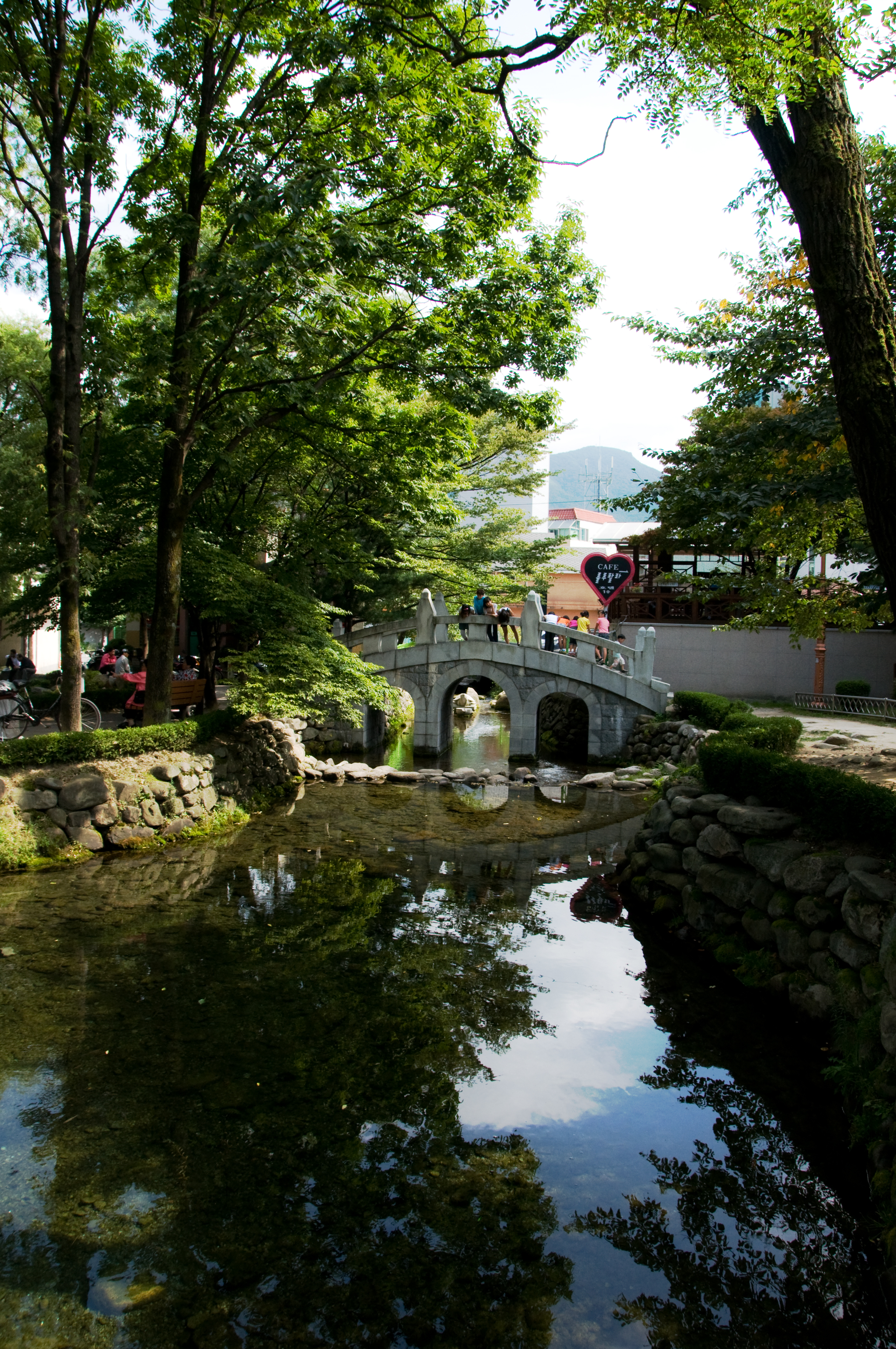 Bridge over Hwangji in Taebaek